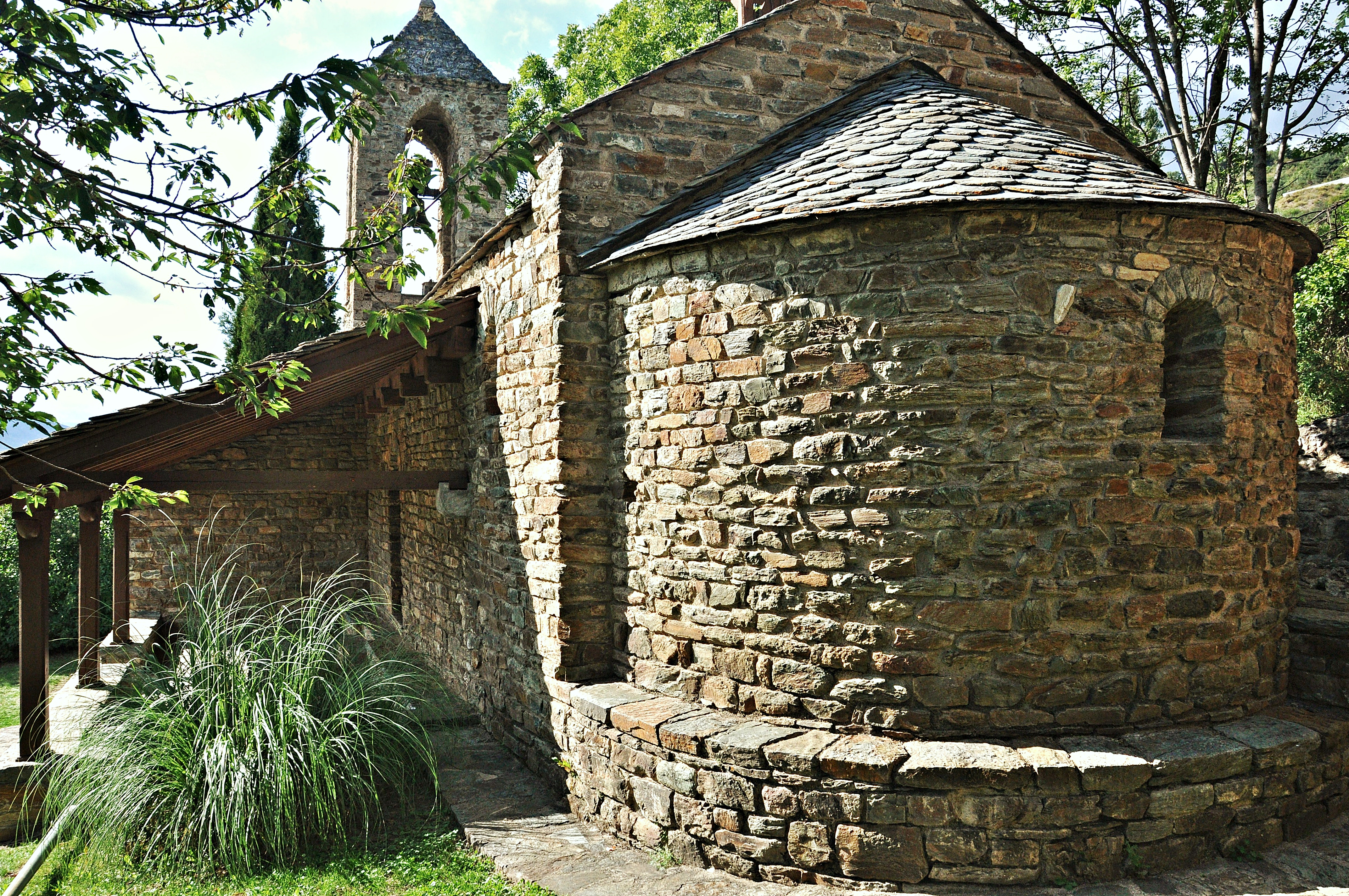 el ripolles-cataluña